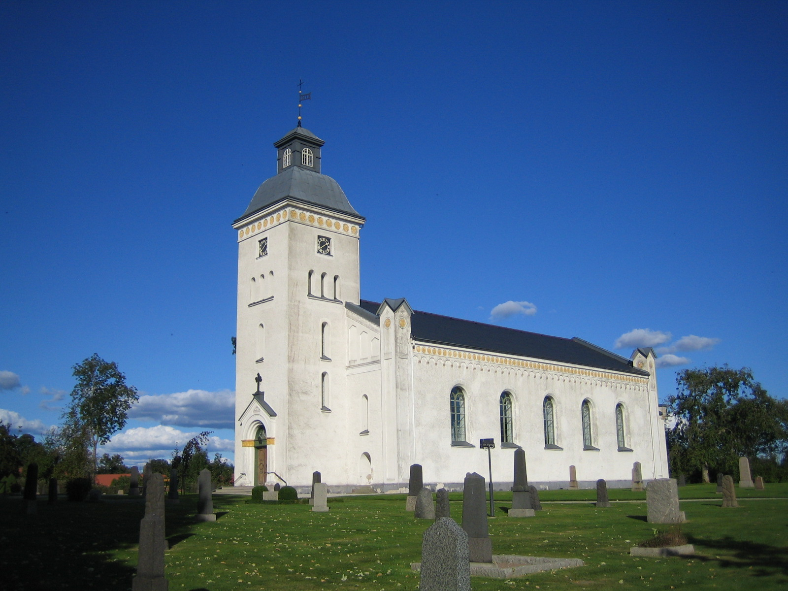 Trollenäs kyrka, Eslövs kommun